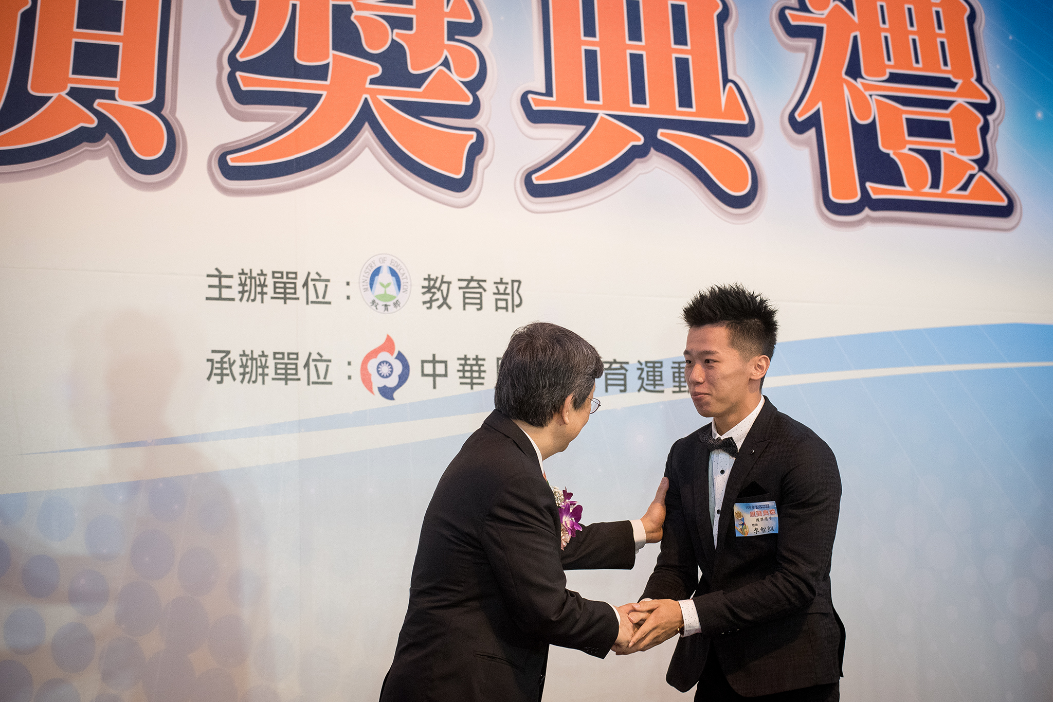 中文（台灣）: 中華民國副總統陳建仁（左）出席「106年年度國光體育獎章暨運動科學獎勵頒獎典禮」，與國光體育獎章獲獎選手李智凱（右）握手。